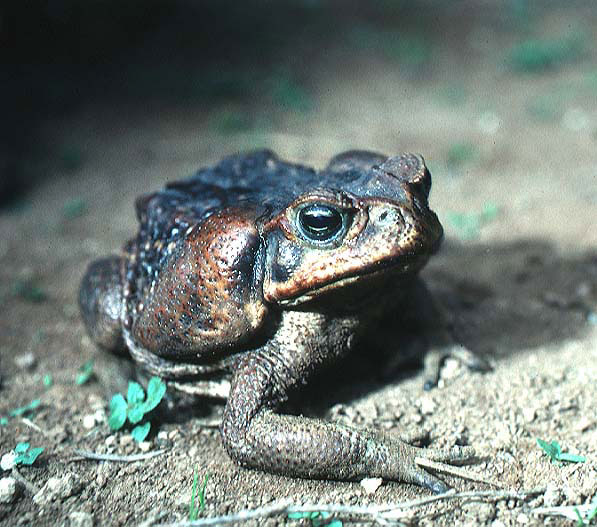 Bufo marinus, Parque Nacional El Imposible, La Fincona, 800 m, Ahuachapan (El Salvador)